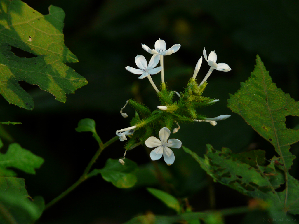 Plumbaginaceae (plumbago family) » Plumbago zeylanica plum-BAY-go -- lead-colored zey-LAN-ee-kuh -- of or from Ceylon (Sri Lanka) commonly known as: Ceylon leadwort, doctorbush, plumbago, white leadwort • Assamese: বগা আগেচিতা boga agechita • Gujarati: ચિત્રક chitrak • Hindi: चीता chita, चित्ता chitta, वहनि vahni • Konkani: चित्रक chitraka • Malayalam: കൊടുവേലി kotuveeli, തുമ്പക്കൊടുവേലി thumpakkotuveeli, വെള്ളക്കൊടുവേലി vellakkotuveeli • Manipuri: telhidak angouba • Marathi: चित्रक chitraka, चित्रमूळ chitramula • Oriya: dhola chitaaparu • Prakrit: चित्तओ chittao • Punjabi: ਚਿੱਤਰਾ chittra • Sanskrit: अग्निः agnih, अनलः analha, चित्रकः chitrakah, दाहक dahak, दहन dahan, दारुण darun, धनंजय dhananjay, द्वयाग्नि dvayagni, हुतशः hutasha, ज्वलन jvalana, कृशानु krishanu, पाठी pathi, पावक pawak, शार्दूलः shardulah, ऊषणः ushanha, वन्हि vanhi • Tamil: கொடுவேலி kotu-veli • Telugu: అగ్ని మాత agni mata Native to: tropical Africa, s China, Indian subcontinent, Indo-China, Malesia, Australia References: Flowers of India • eFlora • NPGS / GRIN • ENVIS - FRLHT • DDSA